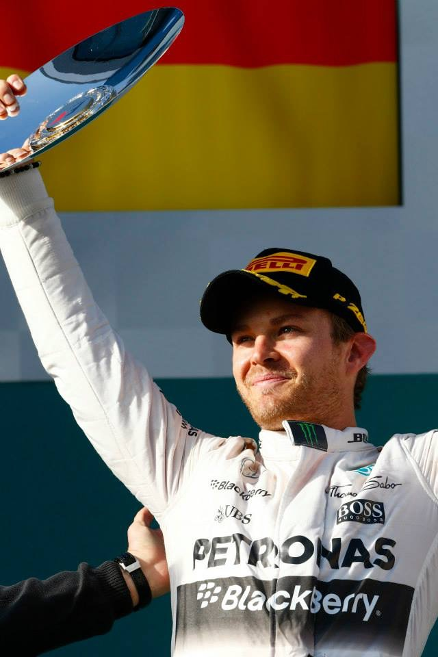 Nico Rosberg obtuvo el segundo lugar